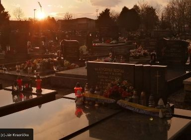 Náhrobok Zinčenka M.L. na cintoríne Dubnica nad Váhom